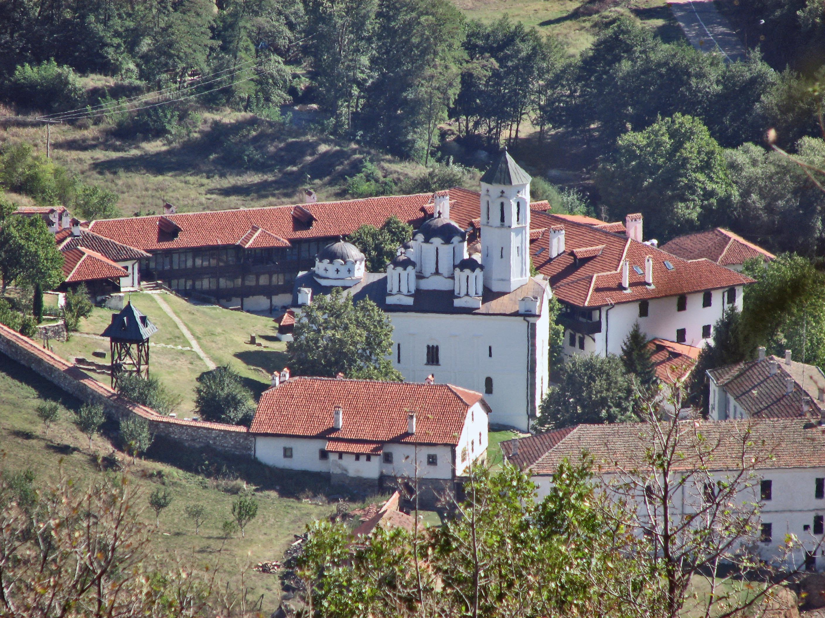 Na zaravni ispod padina planine Kozjak, na levoj obali reke Pčinje, nalazi se manastir posvećen Svetom Prohoru Pčinjskom. Prvi hram podignut je u XI veku. Prema sačuvanom predanju osnovao ga jvizantijski car Roman IV Diogen, u znak zahvalnosti svetitelju, koji mu je prorekao da će jednoga dana postati car.